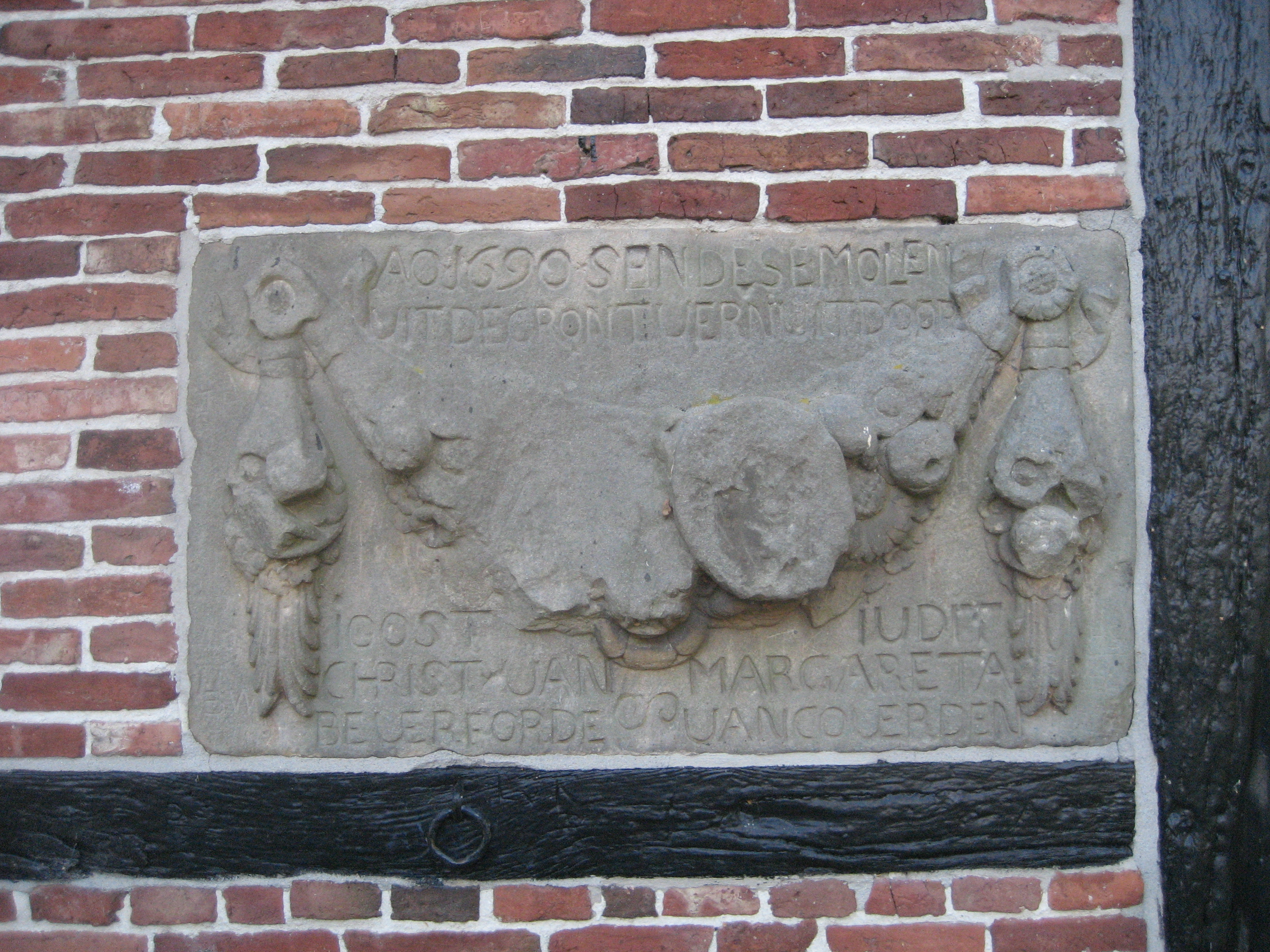 Gedenksteen bij watermolen van Oele (Overijssel, Nederland).Tekst: "A[nn]o 1690. Sendese molen uit de gront vernieut door Ioost Christ van Beverforde & Iudit Margareta van Coverden".